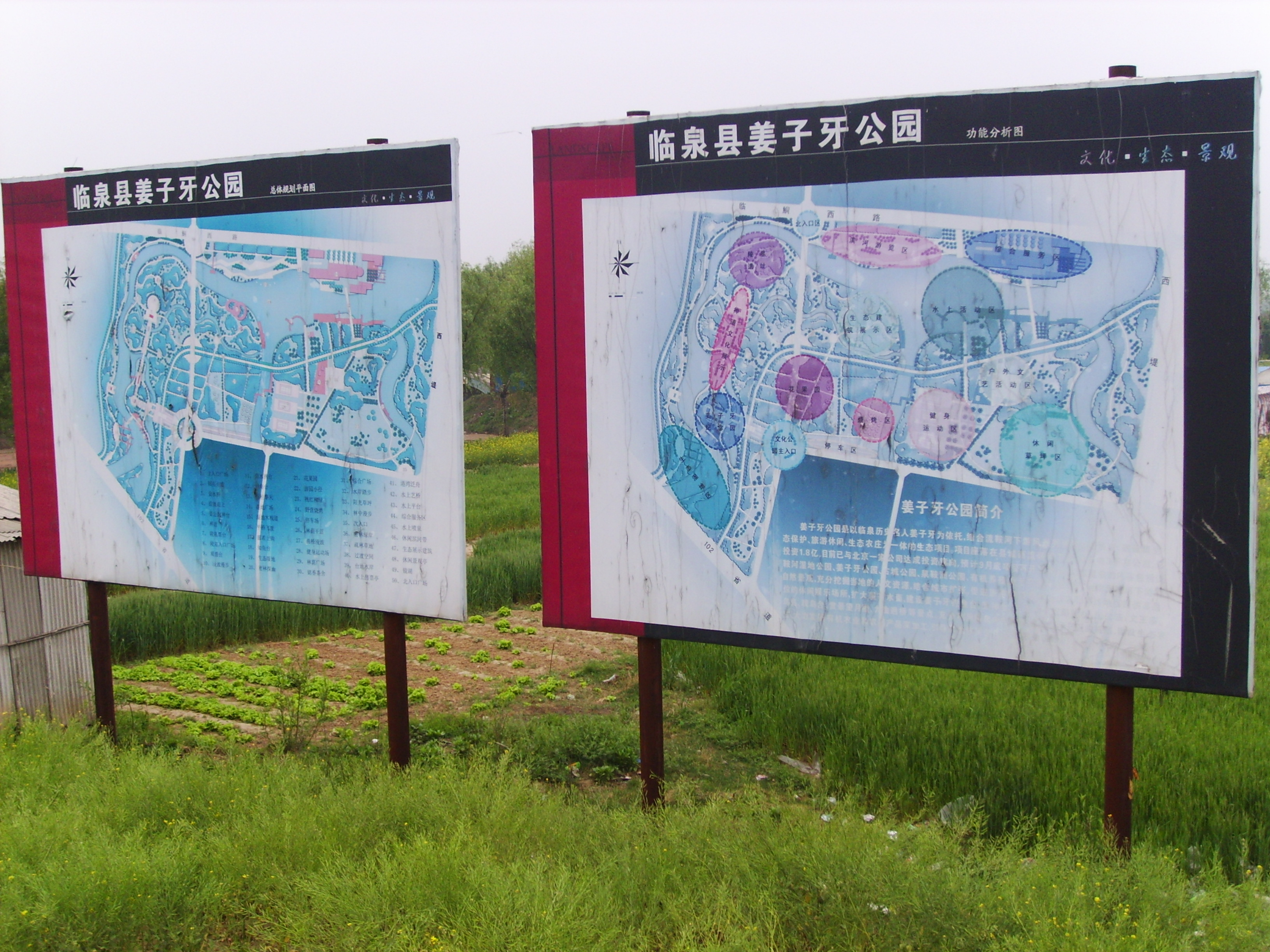 臨泉姜子牙公園未來願景